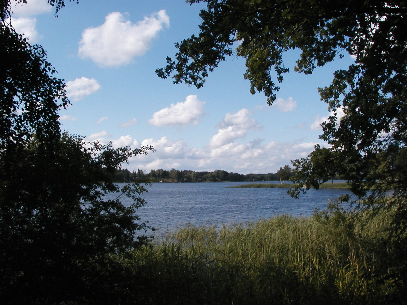 Der Brahmsee in Schleswig-Holsetin, vom Ostufer aus gesehen